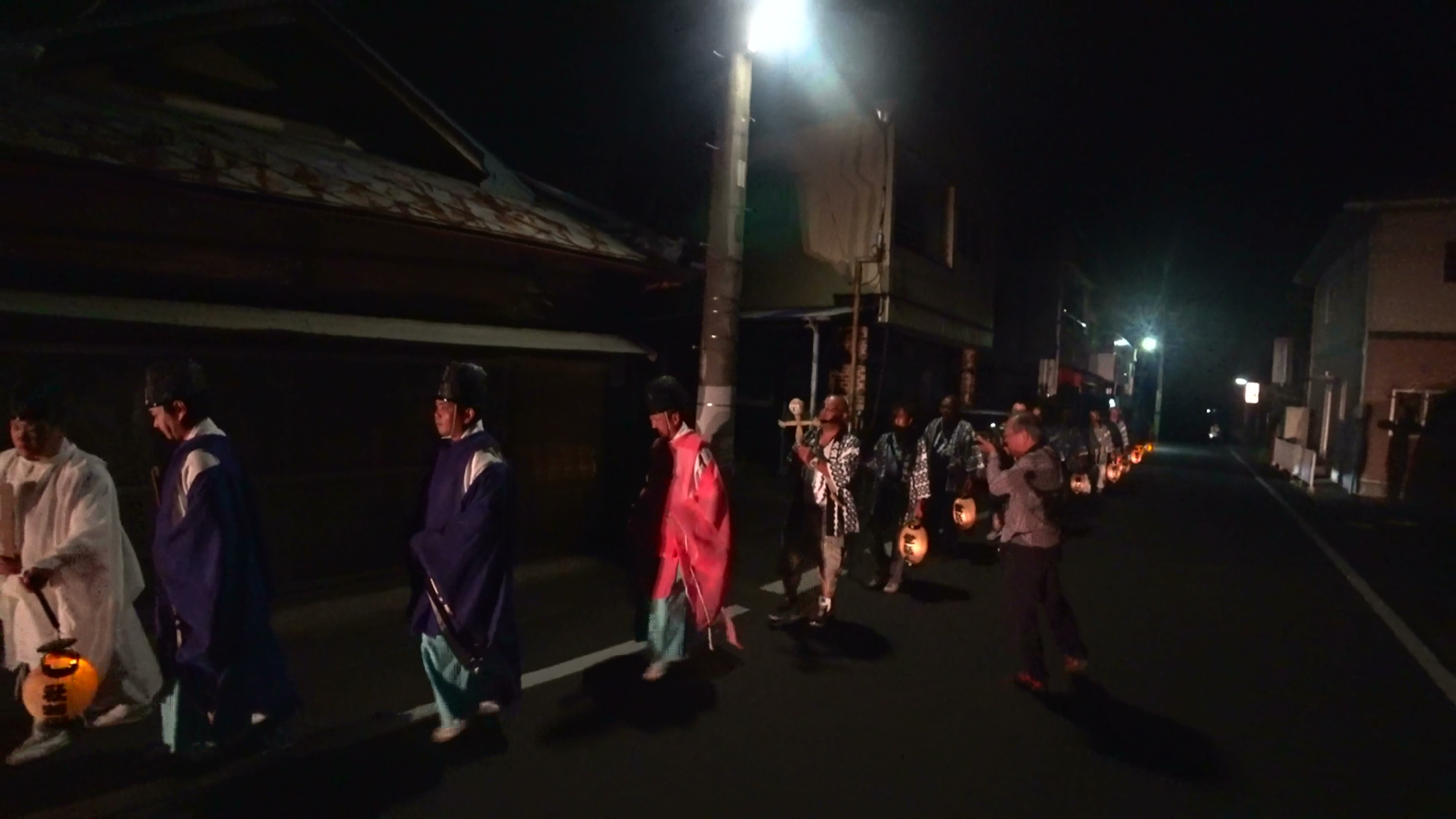 ひとつもの神事で町内を回る